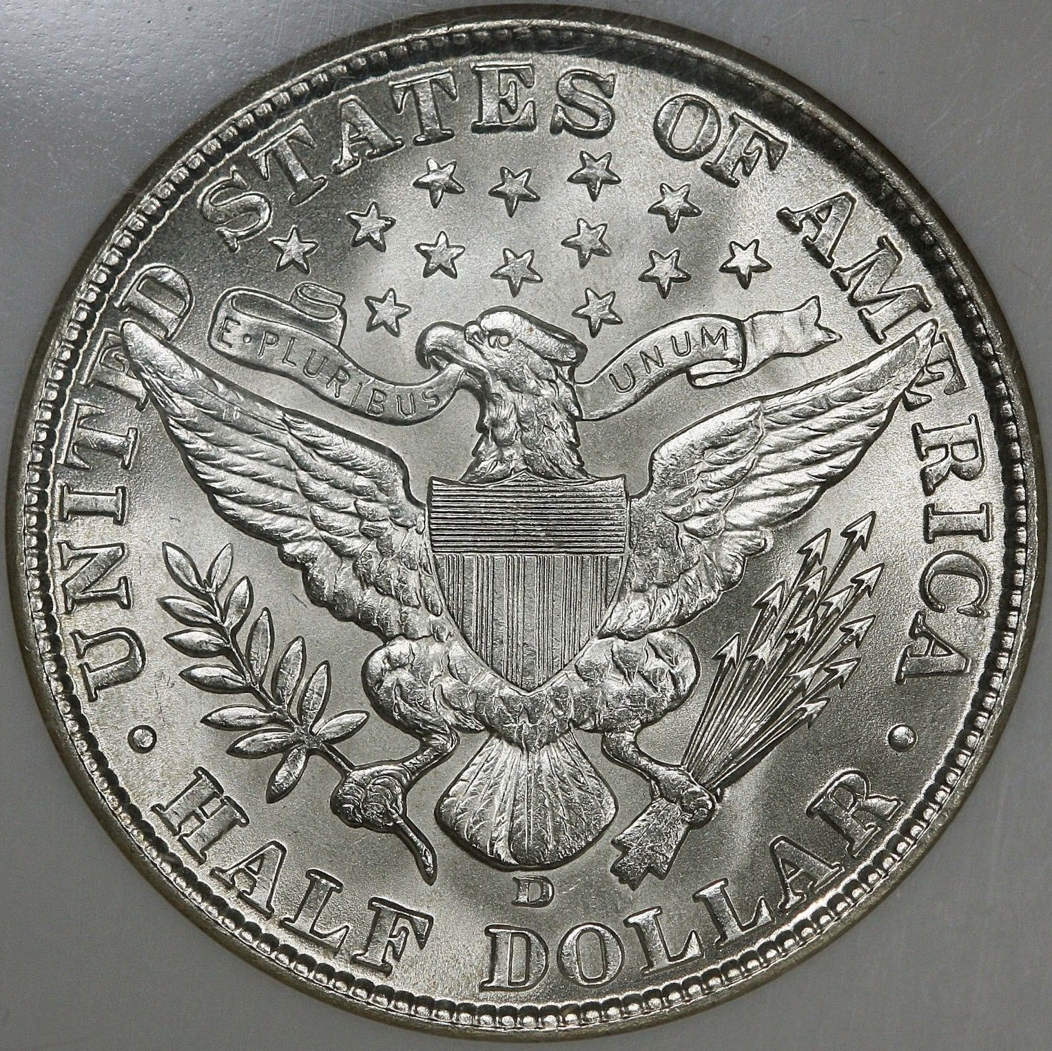 1913-D Barber half dollar reverse